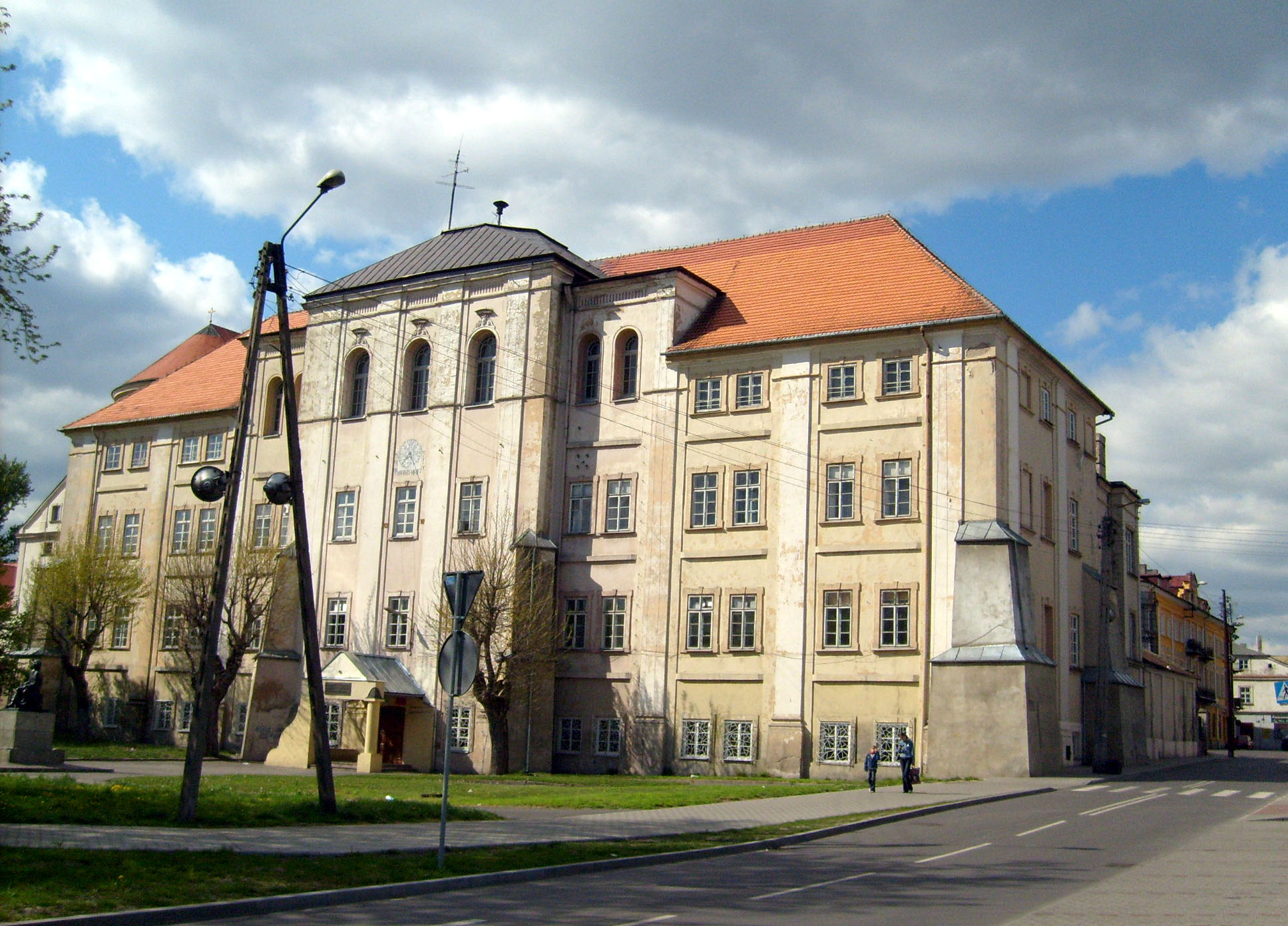 Piotrków Trybunalski, ul. Pijarska 2-4 - dawne "nowe Kolegium" obecnie Liceum im. Bolesława Chrobrego w zespole klasztornym jezuitów (zabytek nr 179-IX-25 z 24.07.1948 oraz 208 z 4.09.1967)